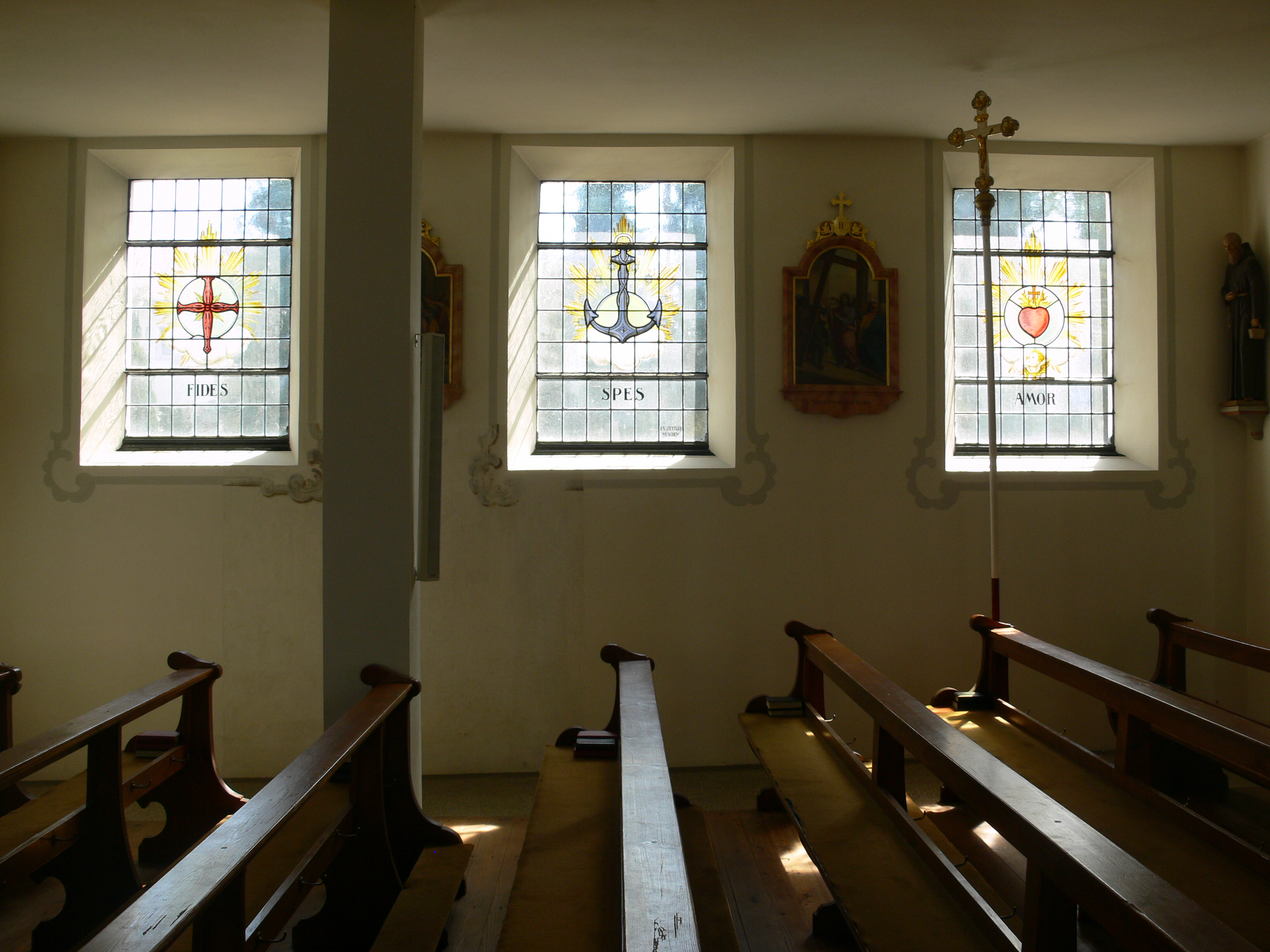 Pfarrkirche St. Konrad und Vinzenz, Fronhofen, Gemeinde Fronreute, Landkreis Ravensburg Fenster "Fides", "Spes", "Amor" (Glaube, Hoffnung, Liebe)